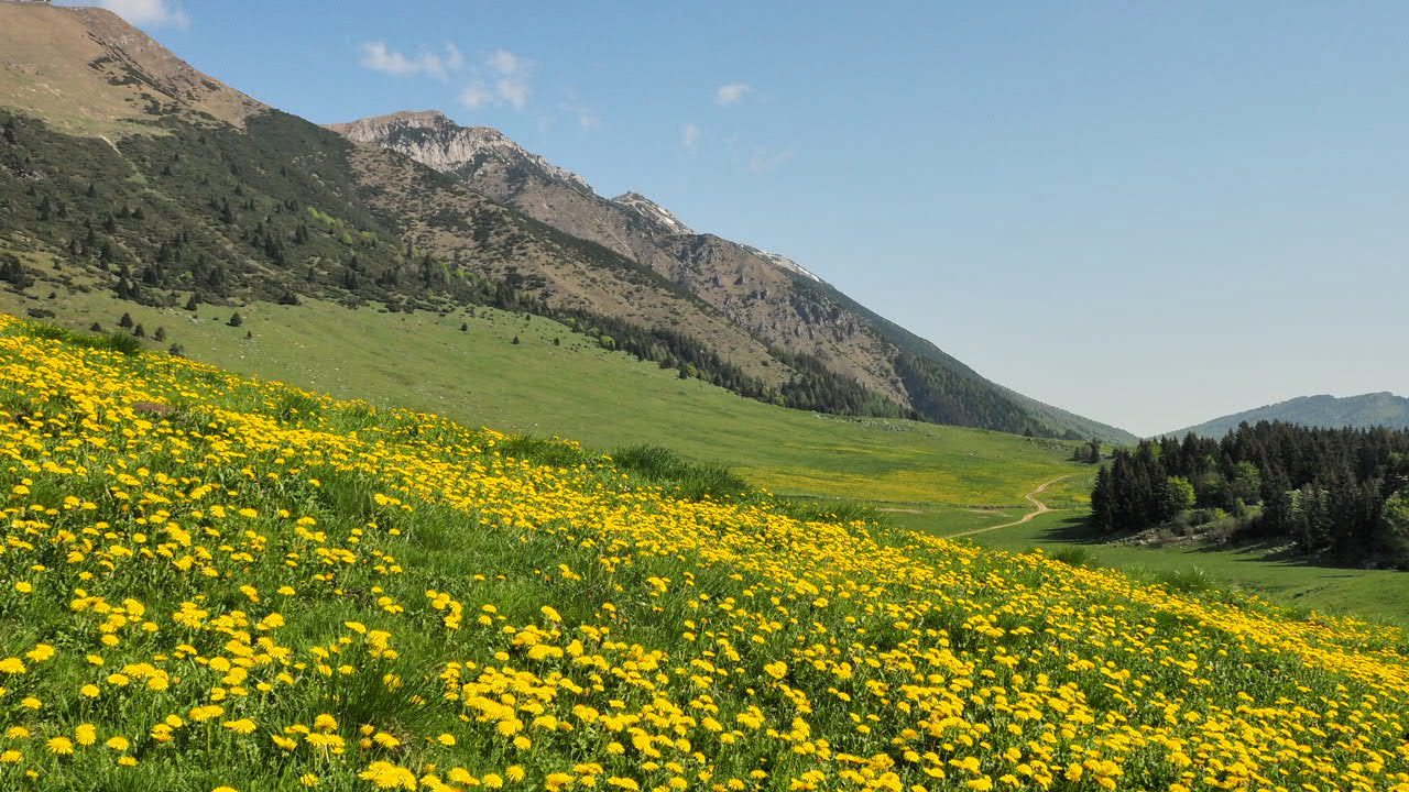 Monte Baldo Est, i primi fiori della stagione.